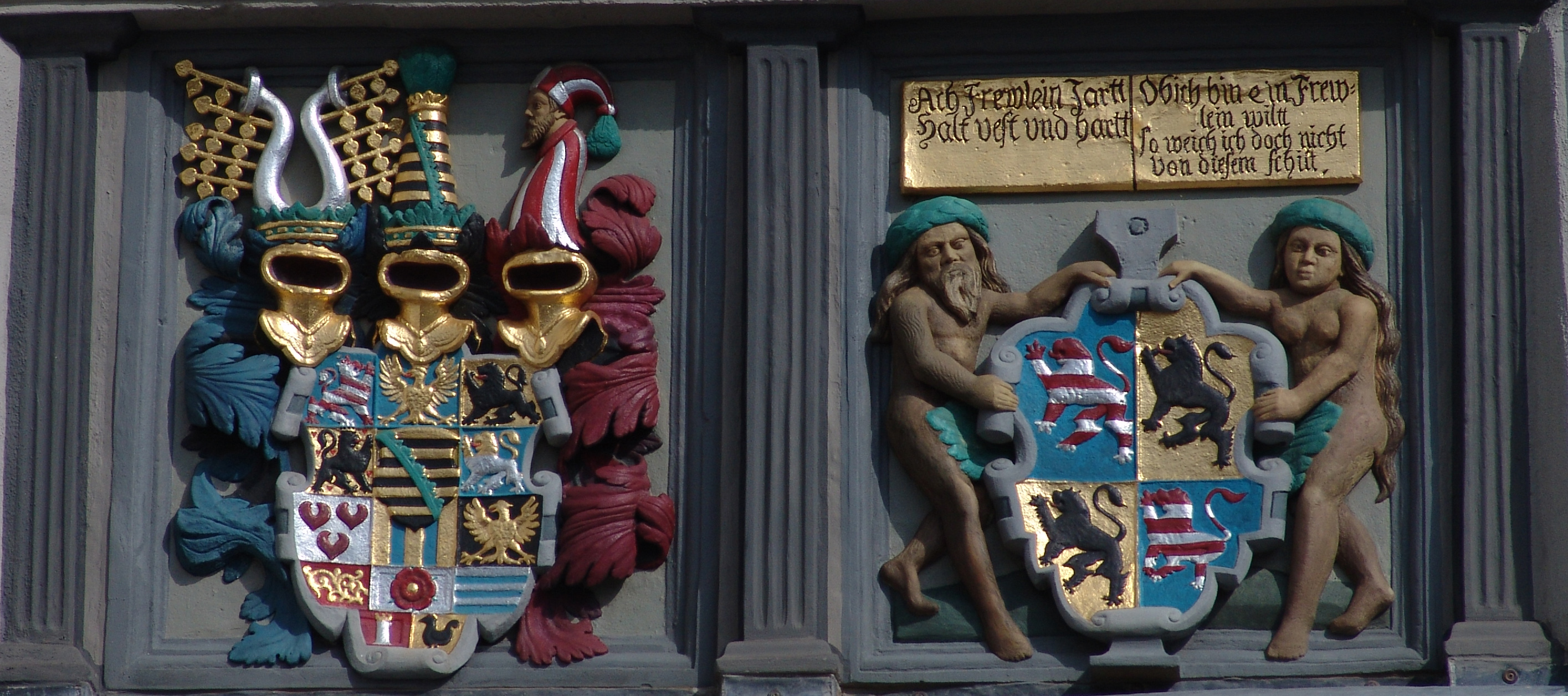 Hildburghausen-Rathaus Wappen